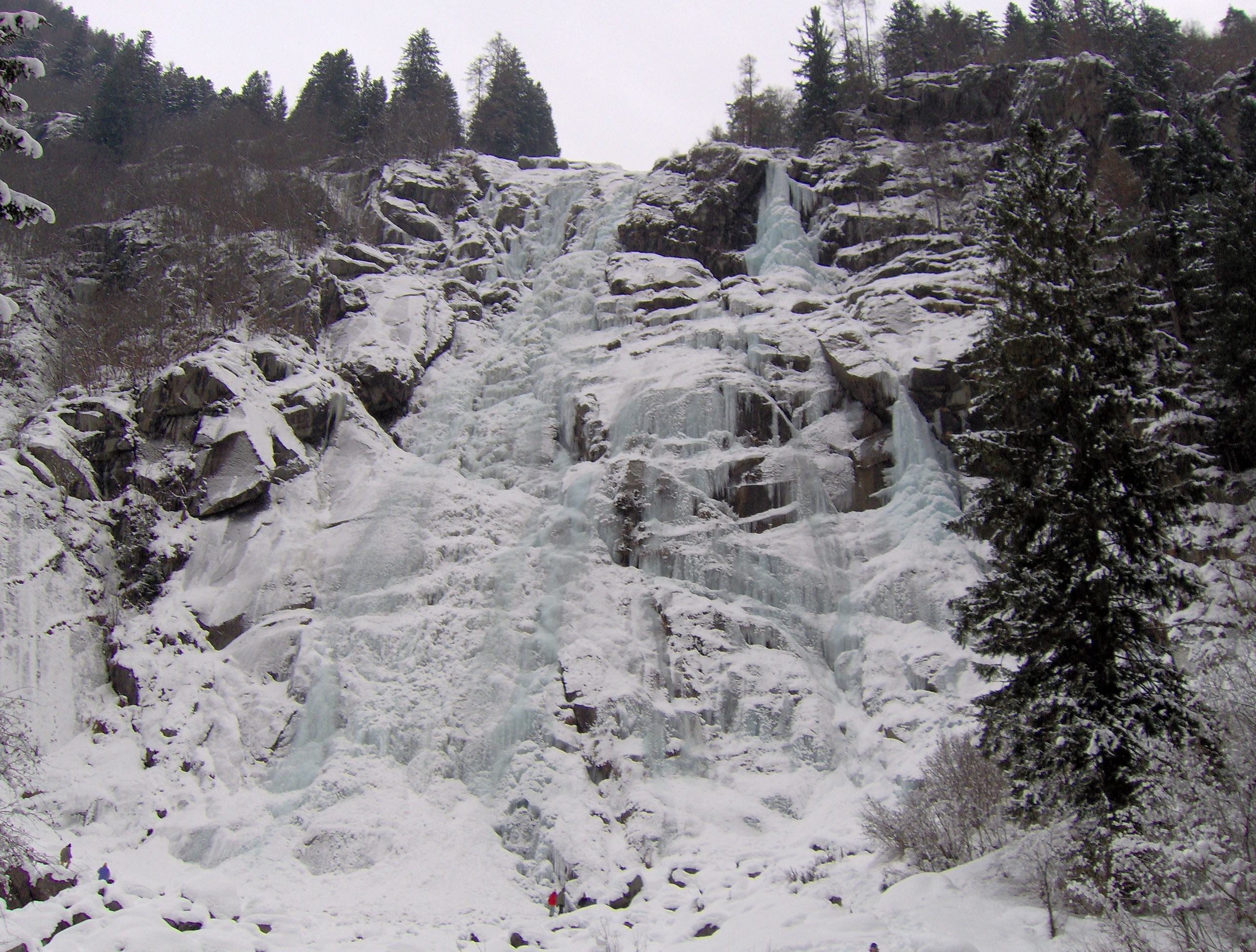 Foto delle cascate Nardis scattata nell'inverno 2006